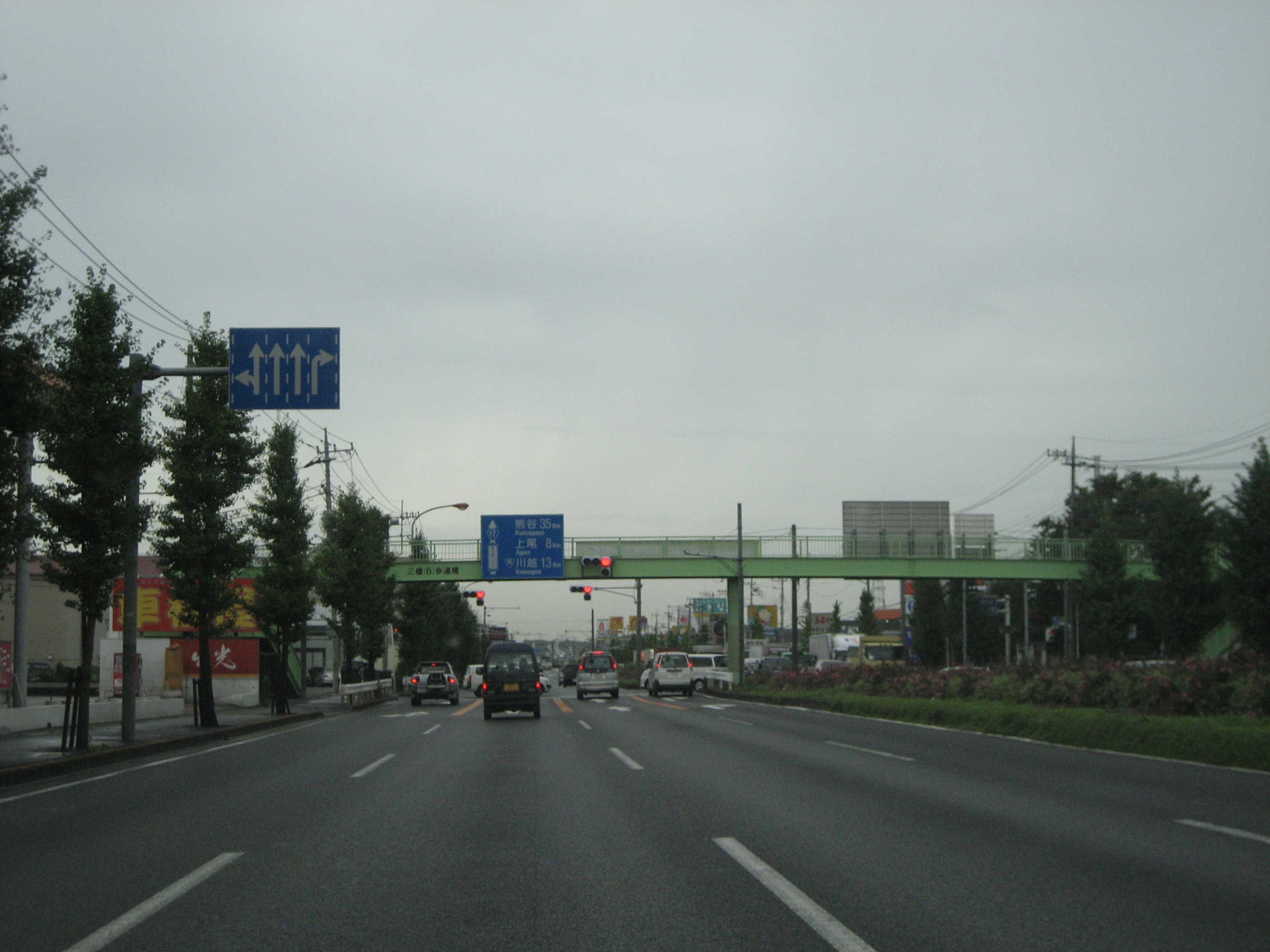 新大宮バイパス大宮区三橋町上尾方面（埼玉県さいたま市西区三橋にて撮影）